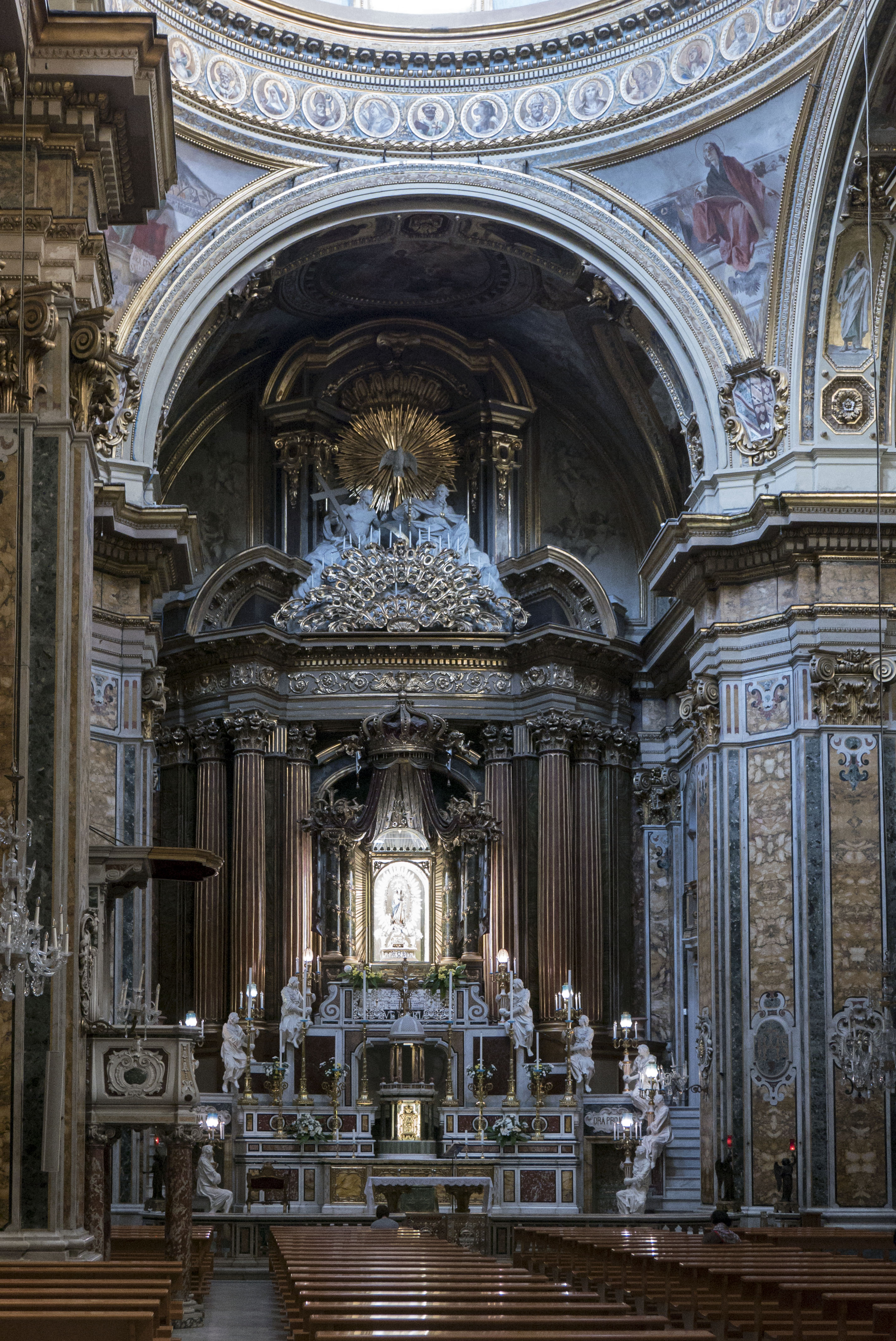 Basilica del Gesù Vecchio